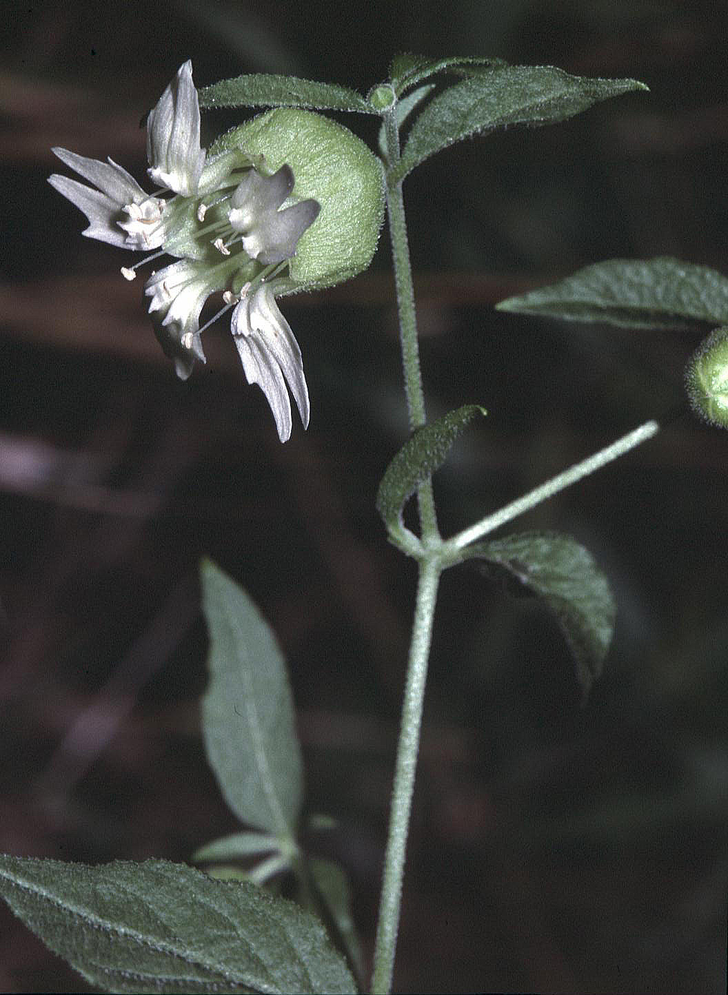 Cucubalus baccifer in Unterfranken